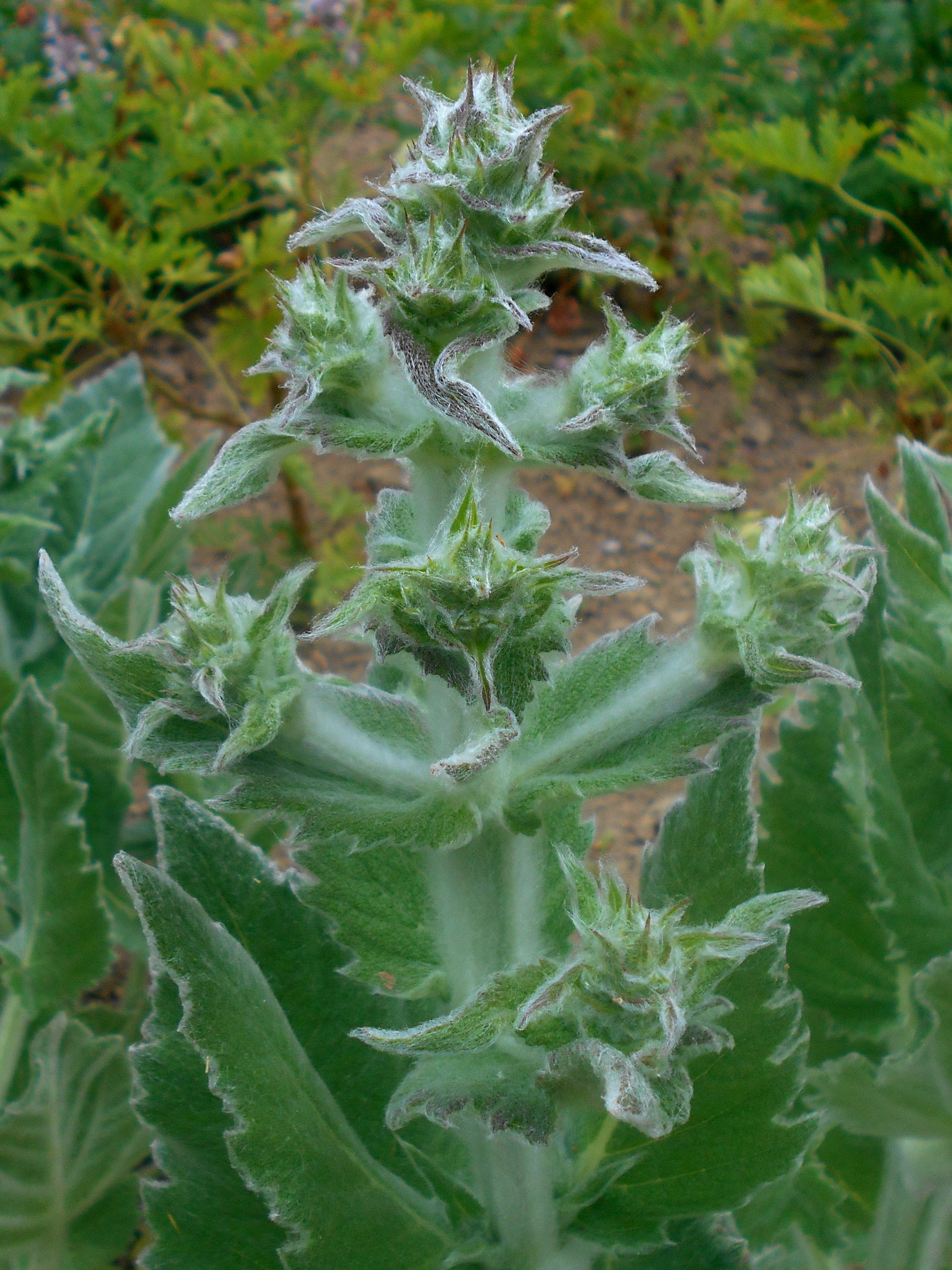 Szałwia etiopska (Salvia aethiopis), Ogród Botaniczny UMCS w Lublinie